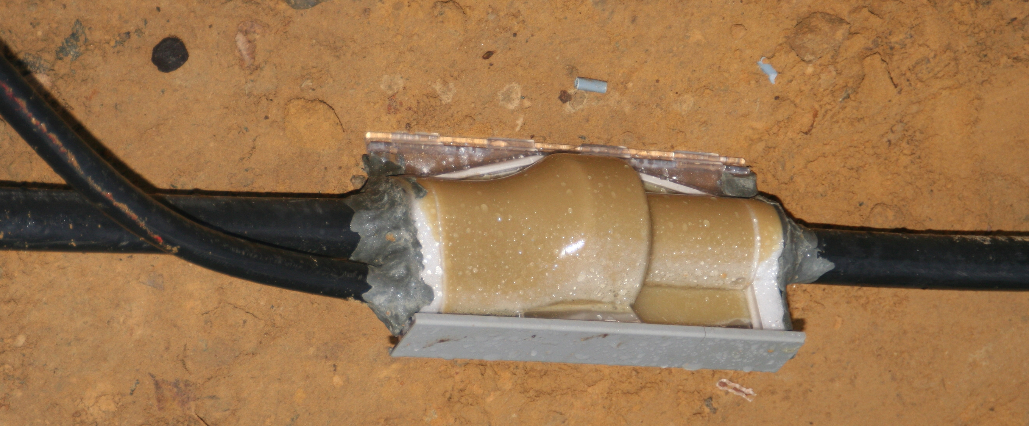 Ofzweigmuff fir elektresch niddervolteg Buedemkabelen, déi mat engem Epoxydhaarz ofgedicht gouf